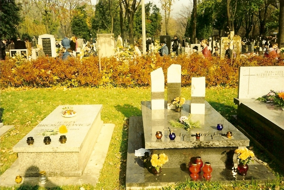 Grobowiec prezesa TPSP Ignacego Trybowskiego w nowej Alei Zasłużonych.